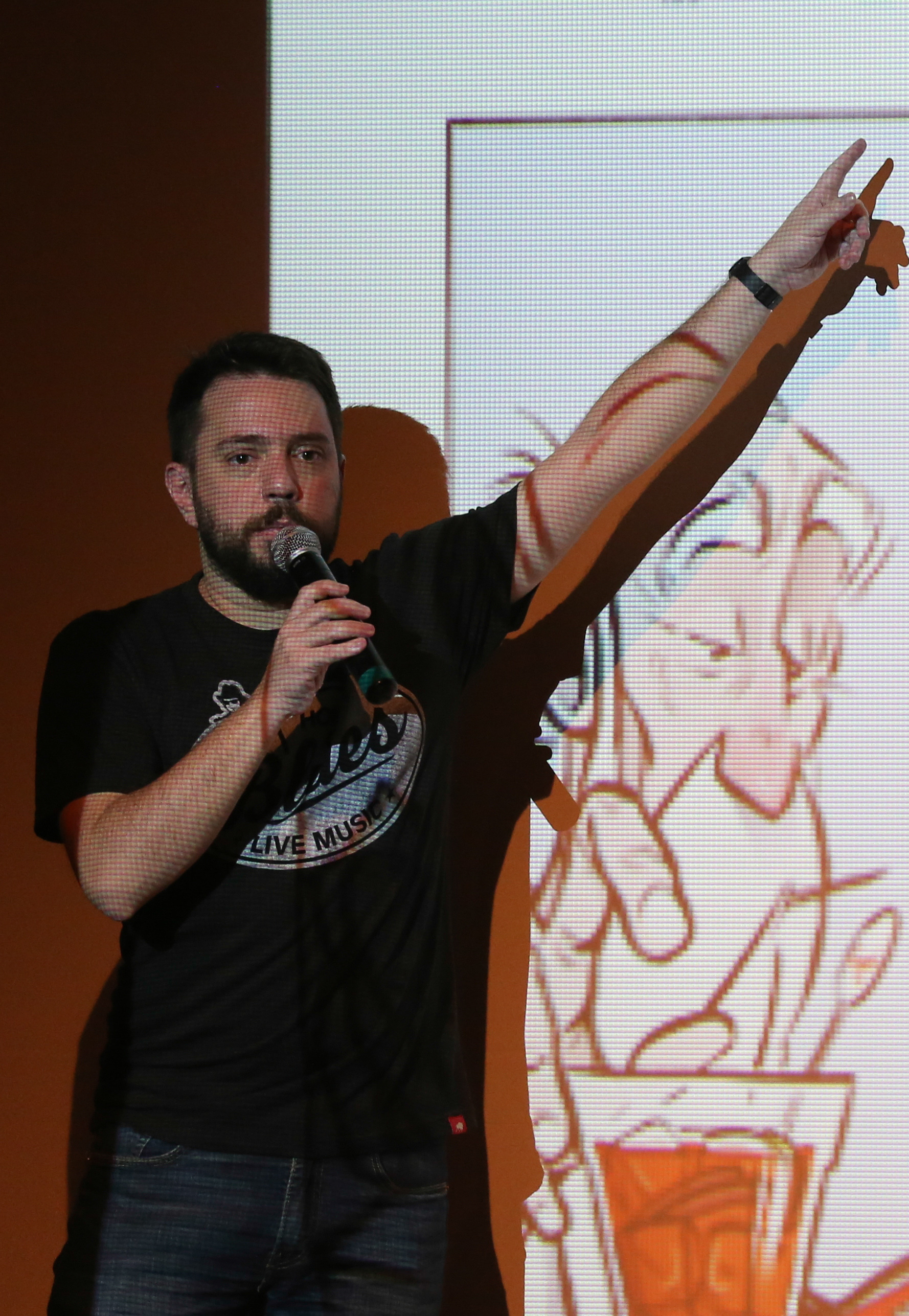 Brasília - Gustavo Duarte apresenta seu trabalho na 2ª edição do EnQuadrinhos, encontro que reúne pesquisadores e profissionais sobre o tema Histórias Brasileiras em Quadrinhos (Fabio Rodrigues Pozzebom/Agência Brasil)